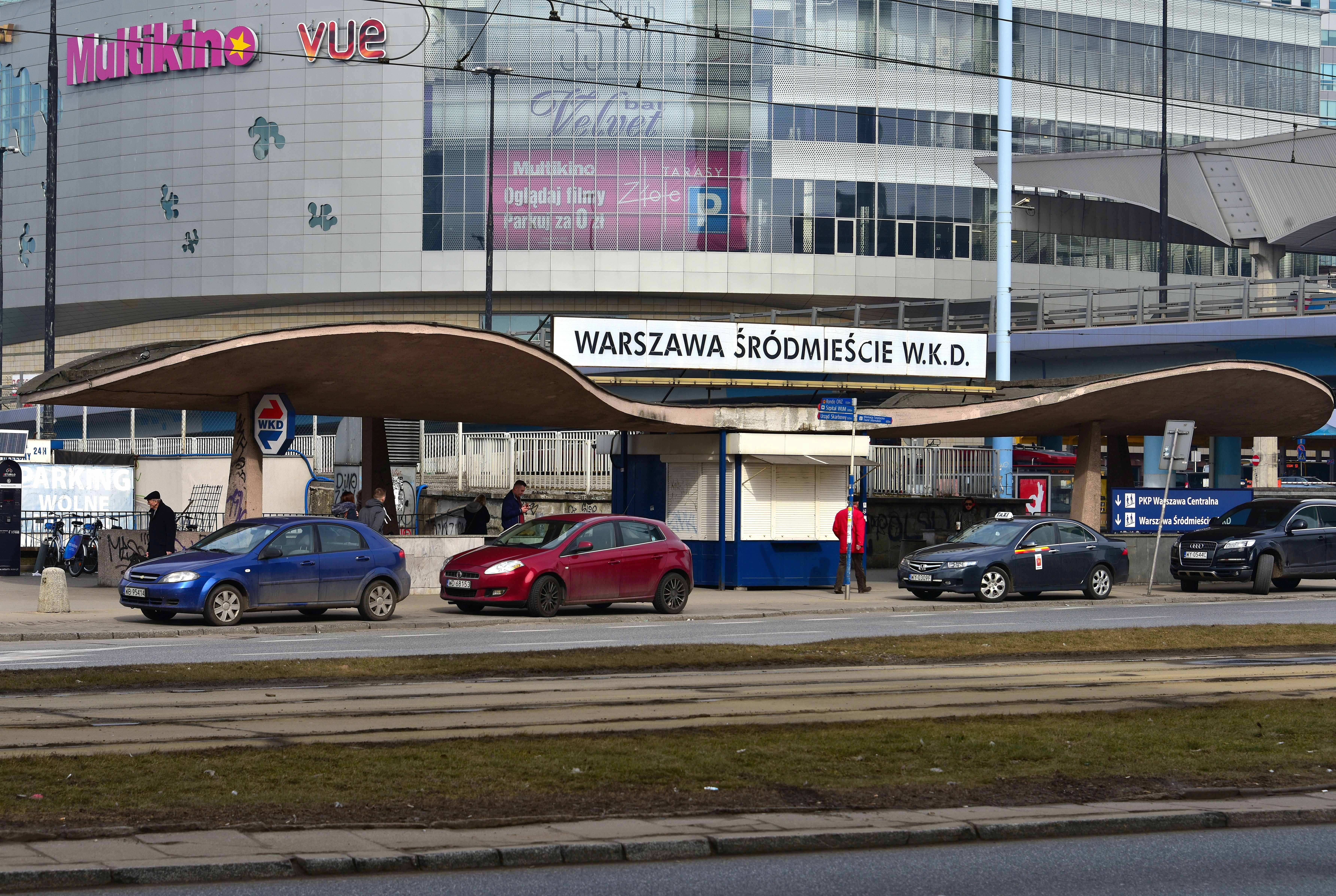 Stacja Warszawa Śródmieście WKD od strony Alej Jerozolimskich